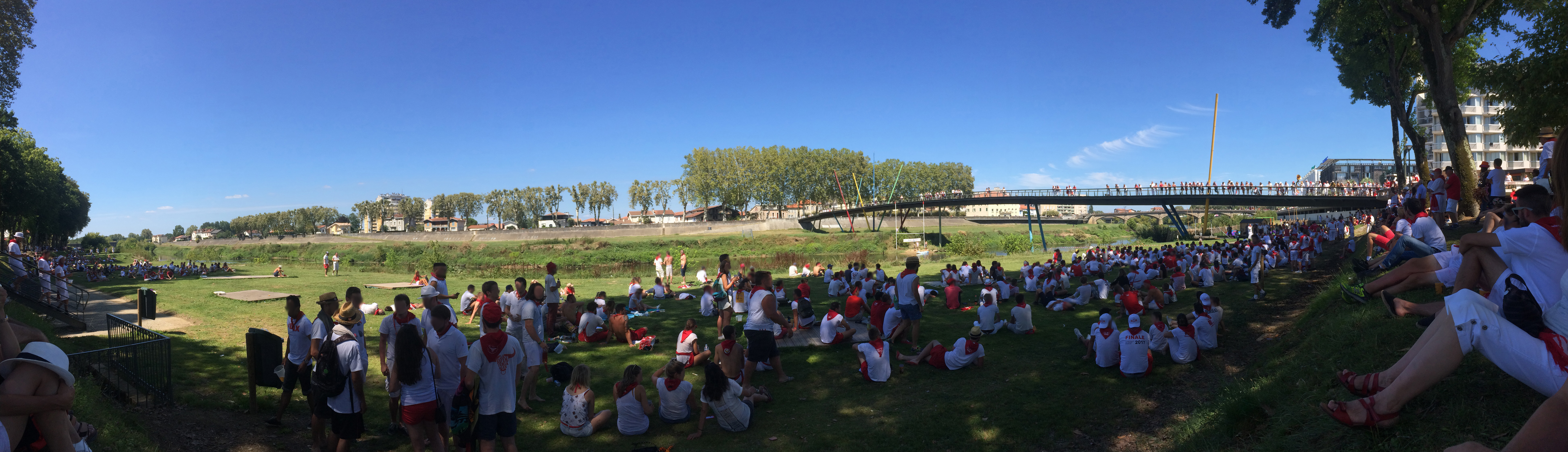 Drop'Adour, féria 2017.